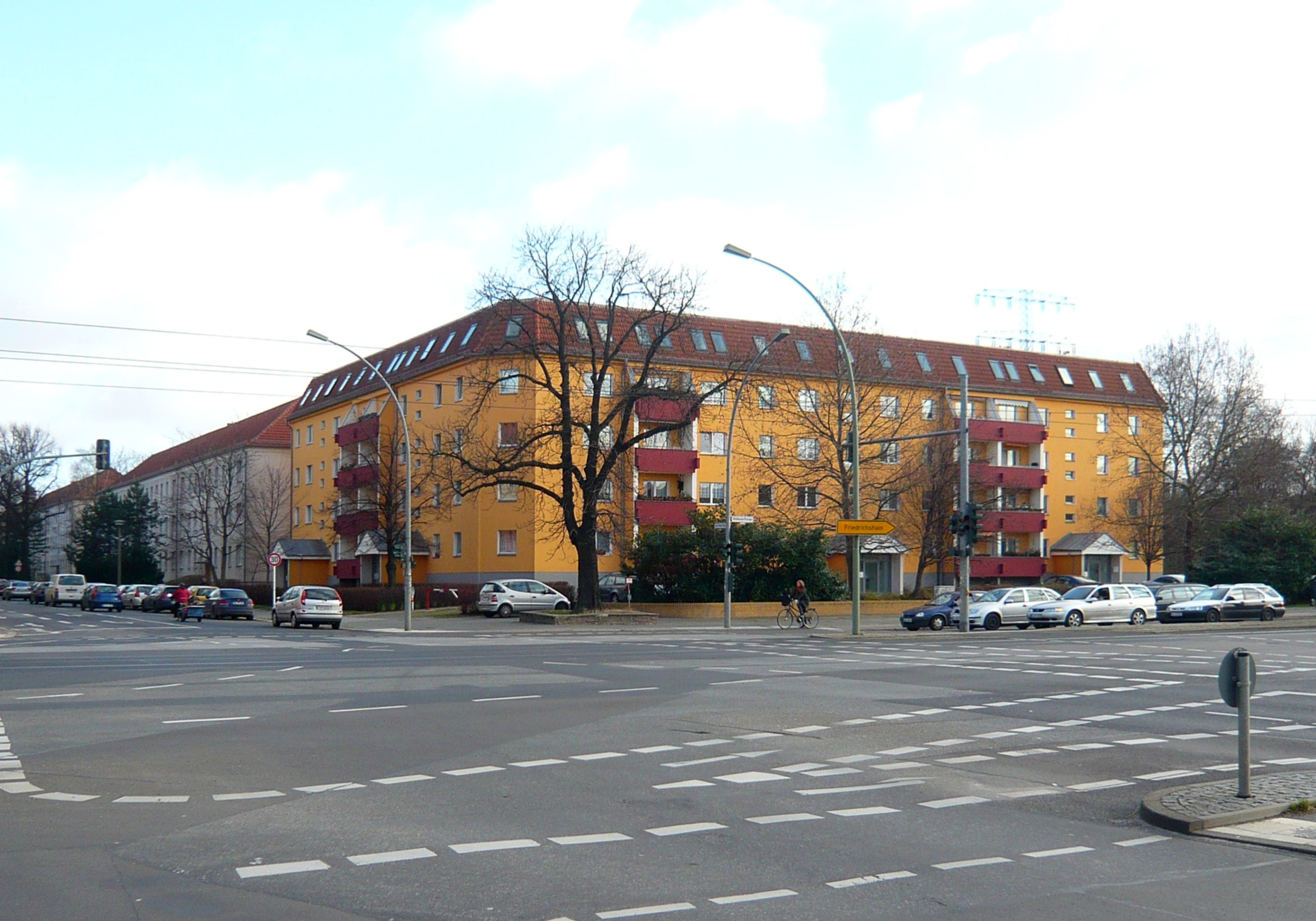 Bezirk Lichtenberg, Möllendorffstraße Ecke Josef-Orlopp-Straße